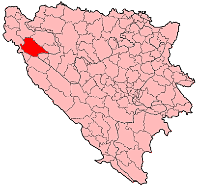 Općina Bosanski Petrovac u Bosni i Hercegovini